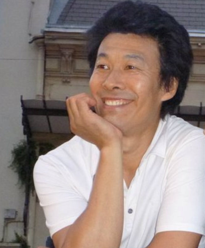 Hang Donfgang, juillet 2011